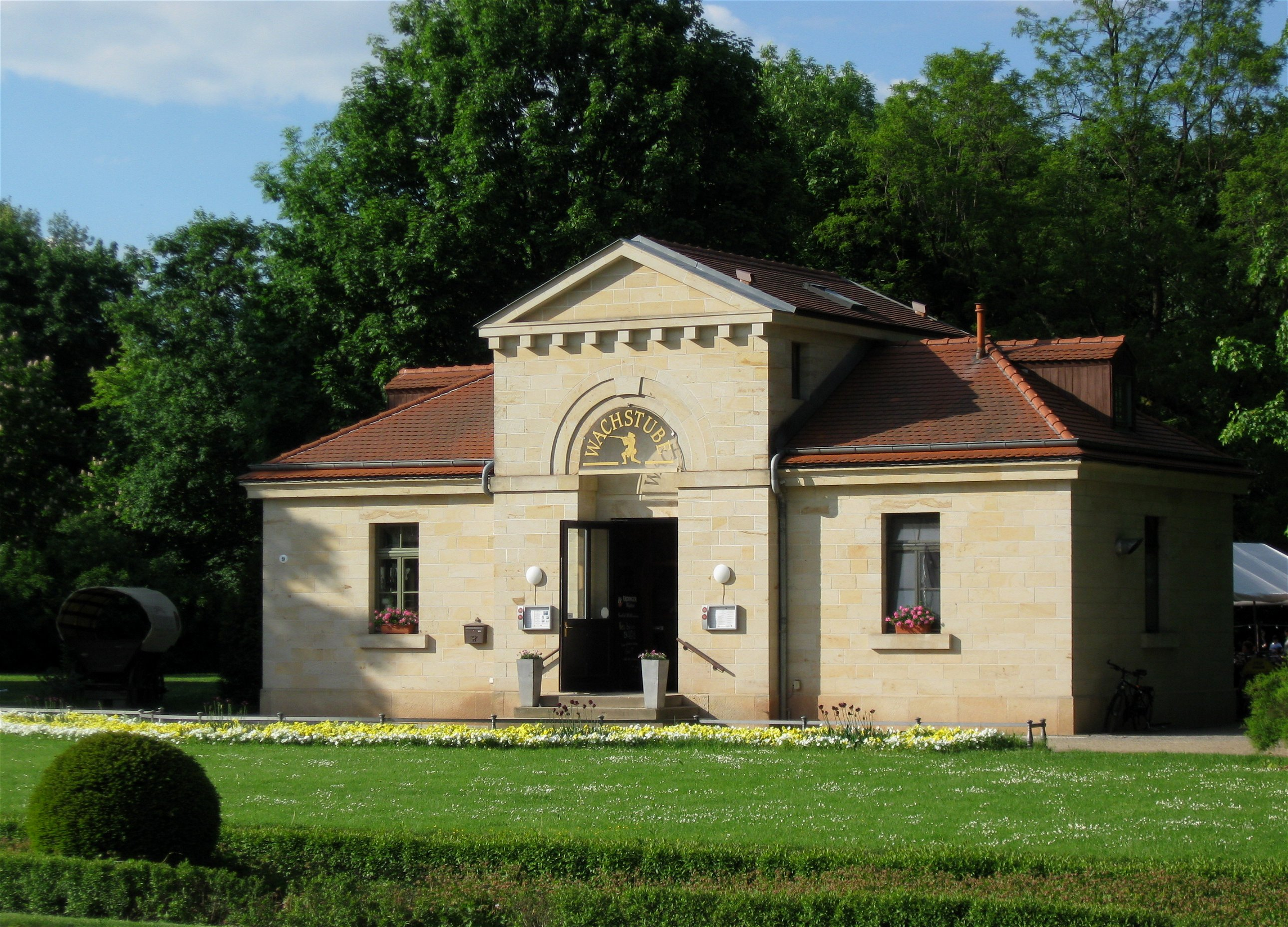 Nördliches Torhaus im Großen Garten, Dresden